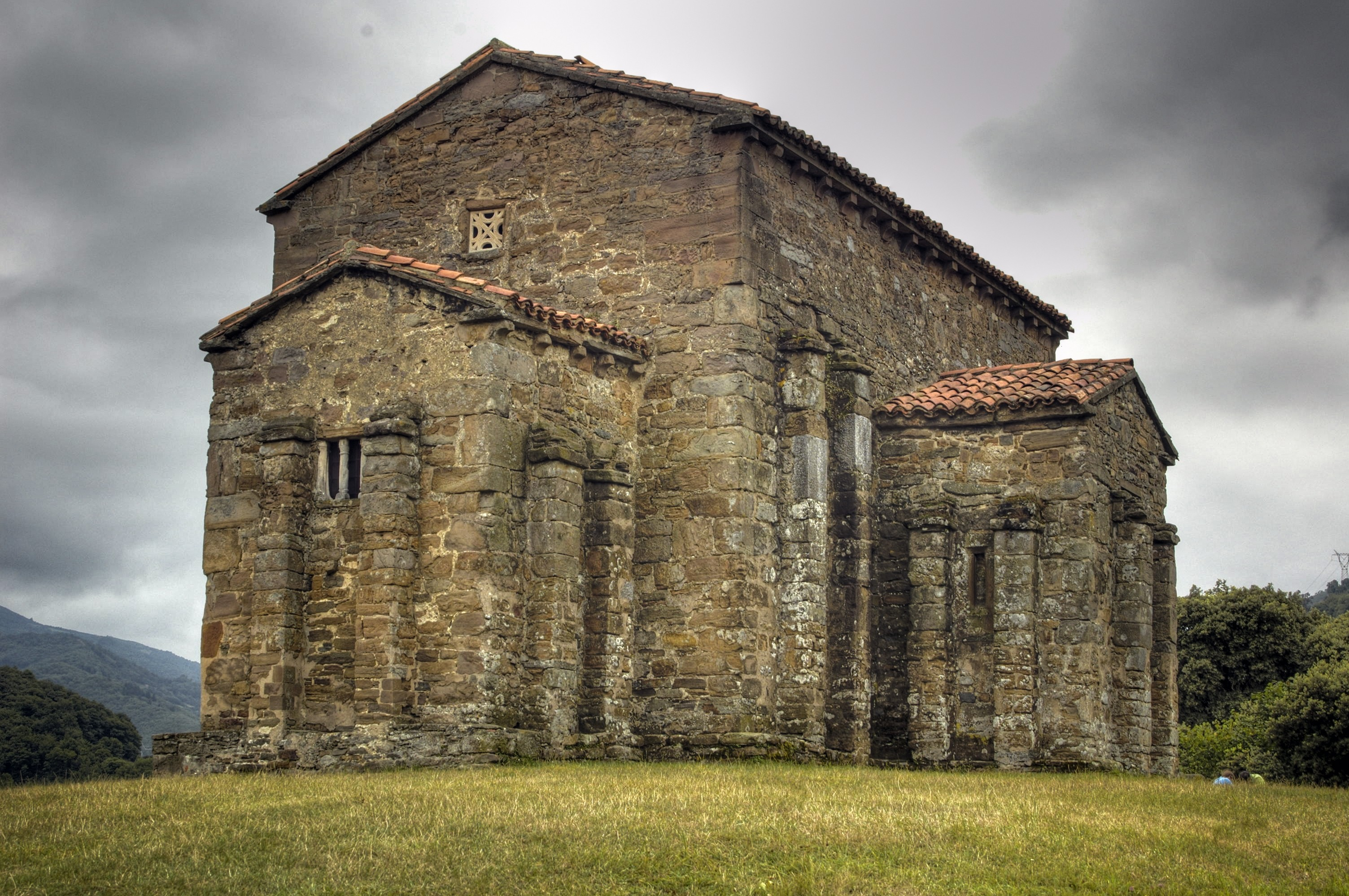 Exterior de la iglesia desde el Suroeste, vista posterior.